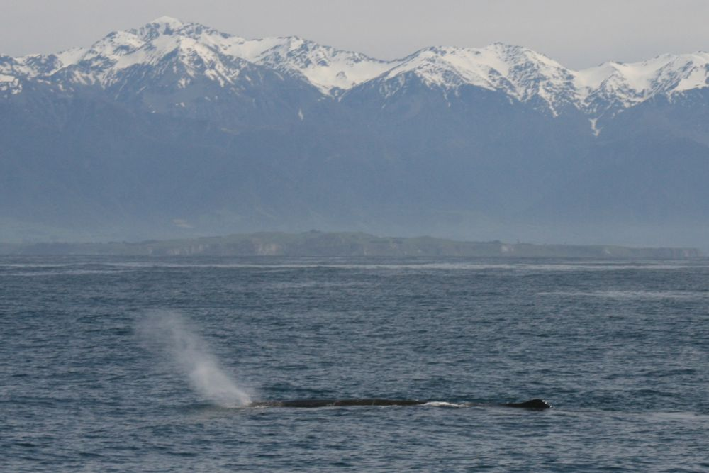 Blas eines Pottwales mit typischer 45°-Neigung (vor Kaikoura, Neuseeland)